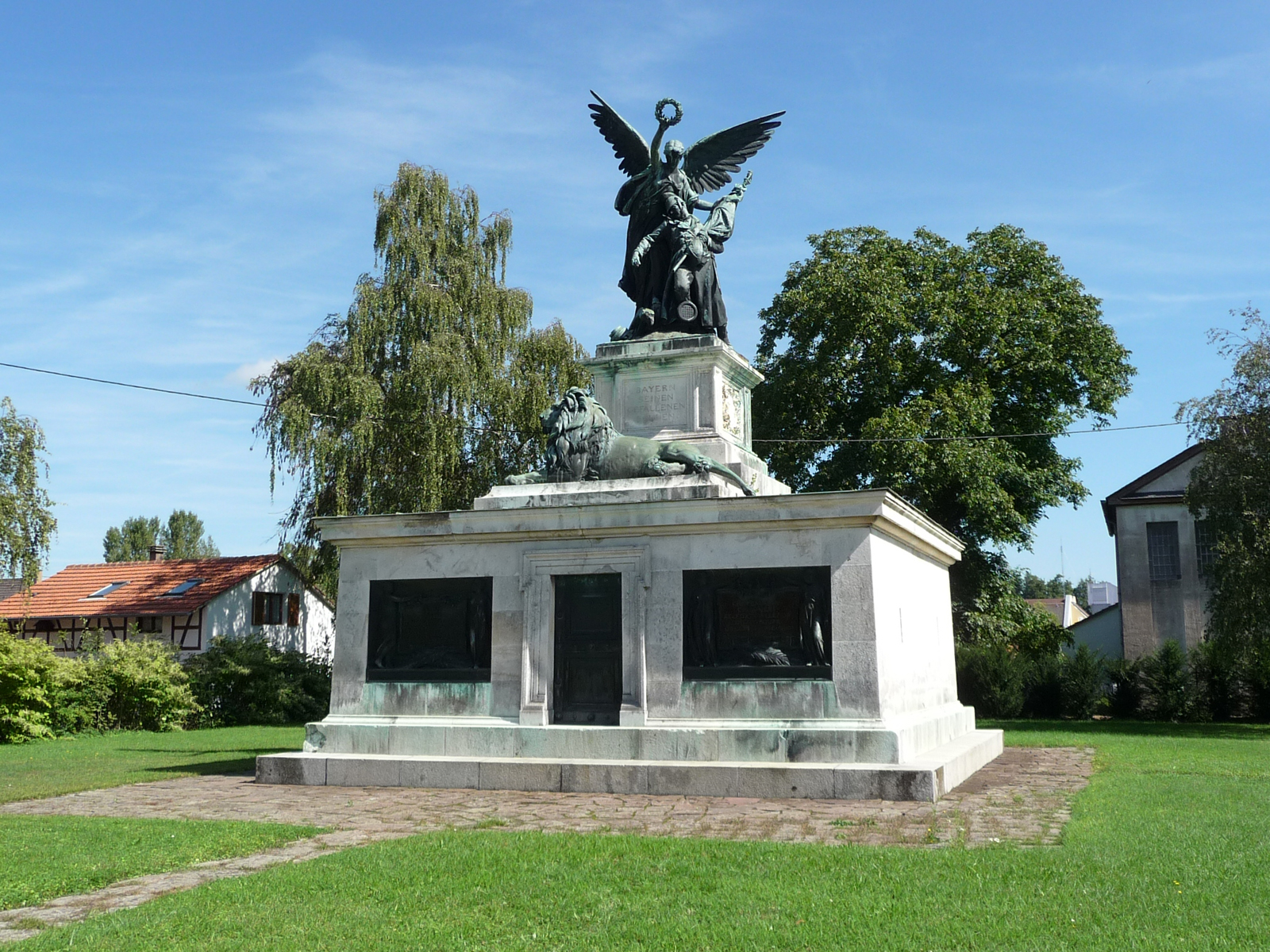 Monument bavarois à Woerth à l'intersection de la D27 et de la D28